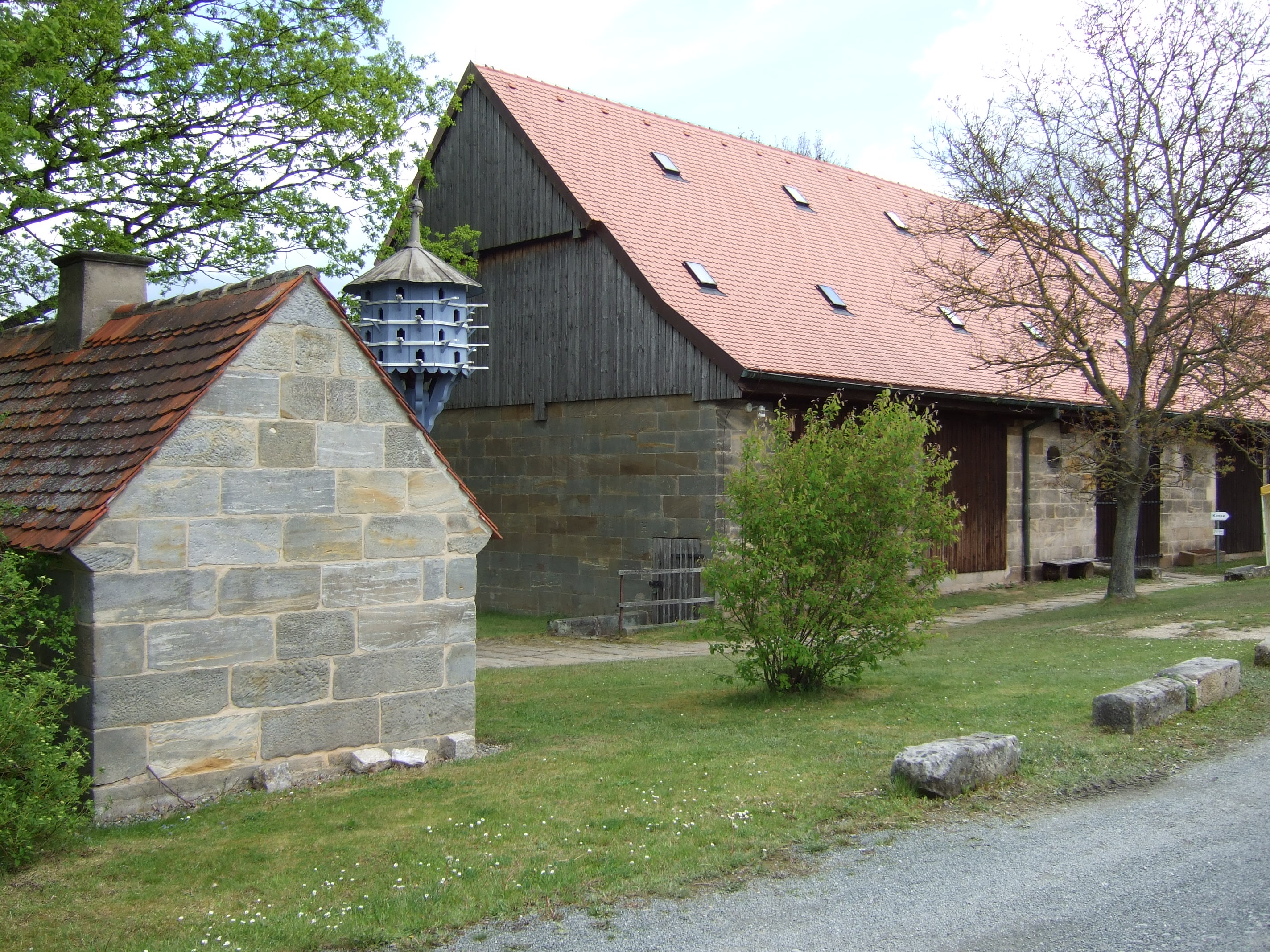 Bayreuth, Adolf-Wächter-Straße 17. Ehemaliges Wohnstallhaus. Heute Museum für bäuerliche Arbeitsgeräte, eingeschossiger Sandsteinbau mit verschaltem Fachwerkgiebel, bezeichnet „1745“ und „1779“.